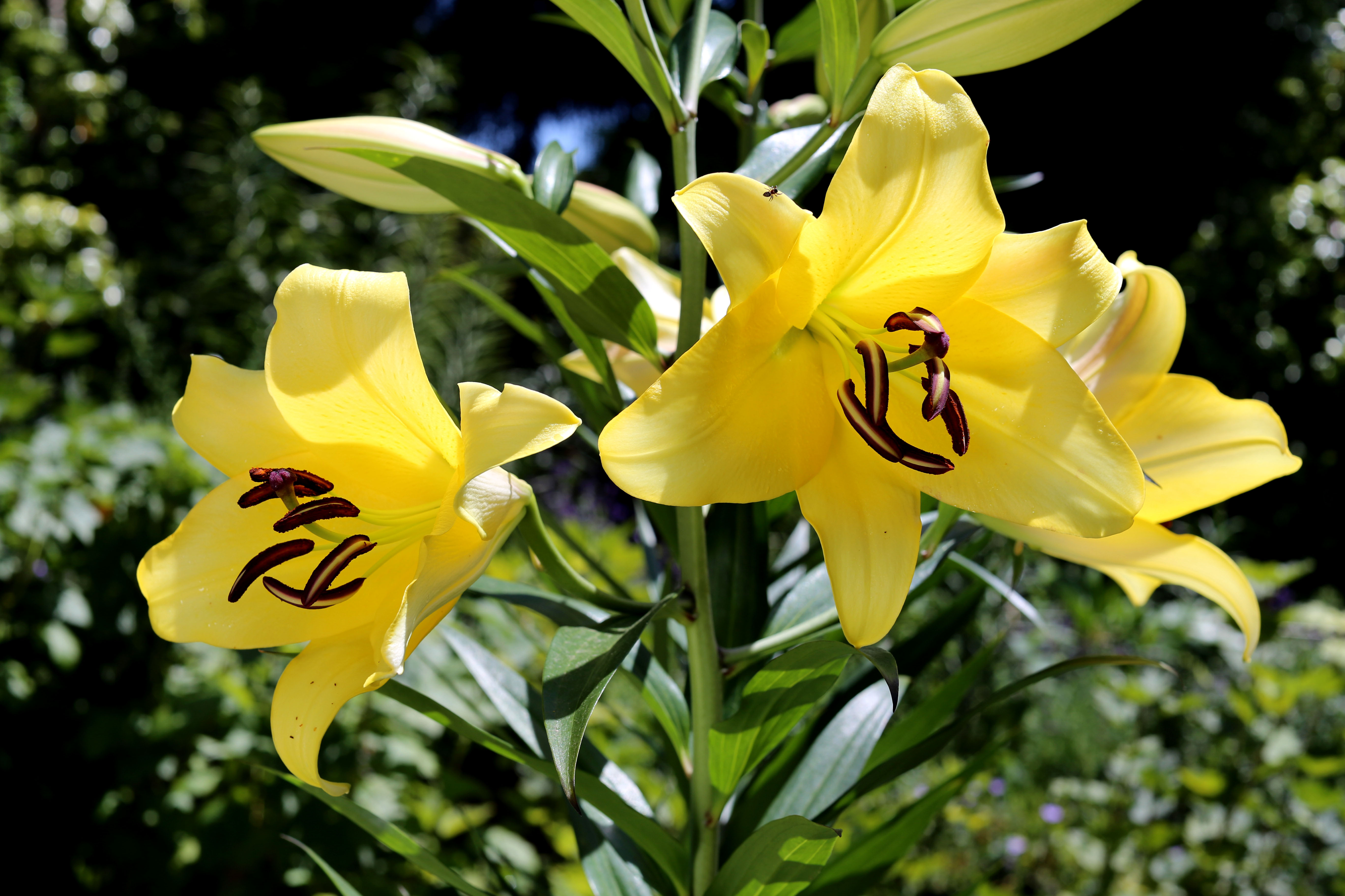 Hybridlilie mit Sortenname Golden Splendour, zwei Blüten, manchmal auch mit Bezeichnung Golden Splendor, totale Blüten und Pflanze